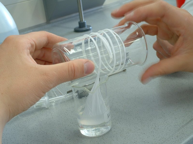 Darstellung eines Nylon-6,6-Fadens aus Adipinsäuredichlorid und Hexamethylendiamin im Labor; Bild selbst erstellt an der Universität Ulm